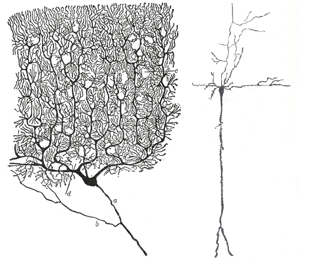 Image:Gray628.png und Image:Gray627.png